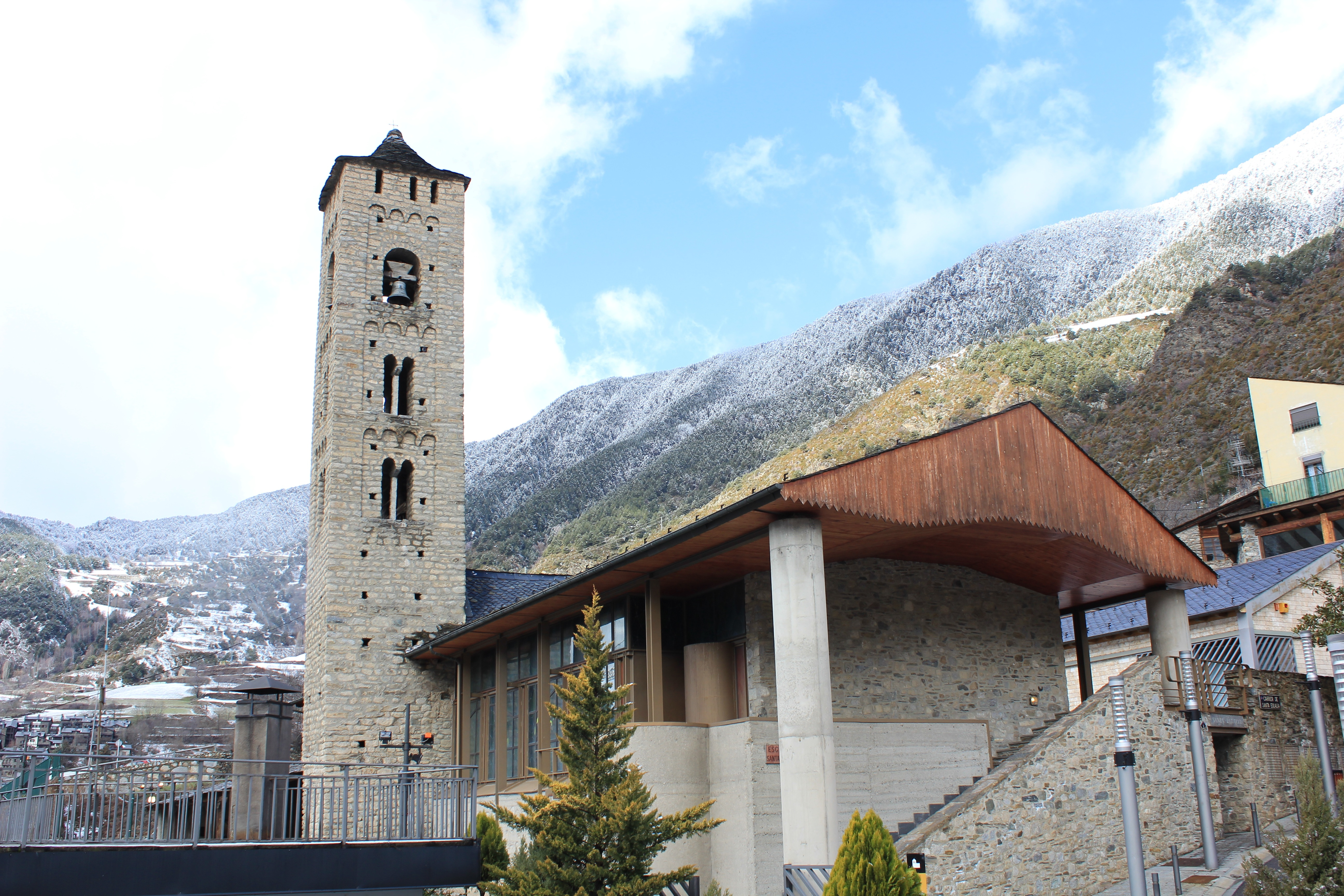 Església i Comunidor de Santa Eulàlia (Encamp)